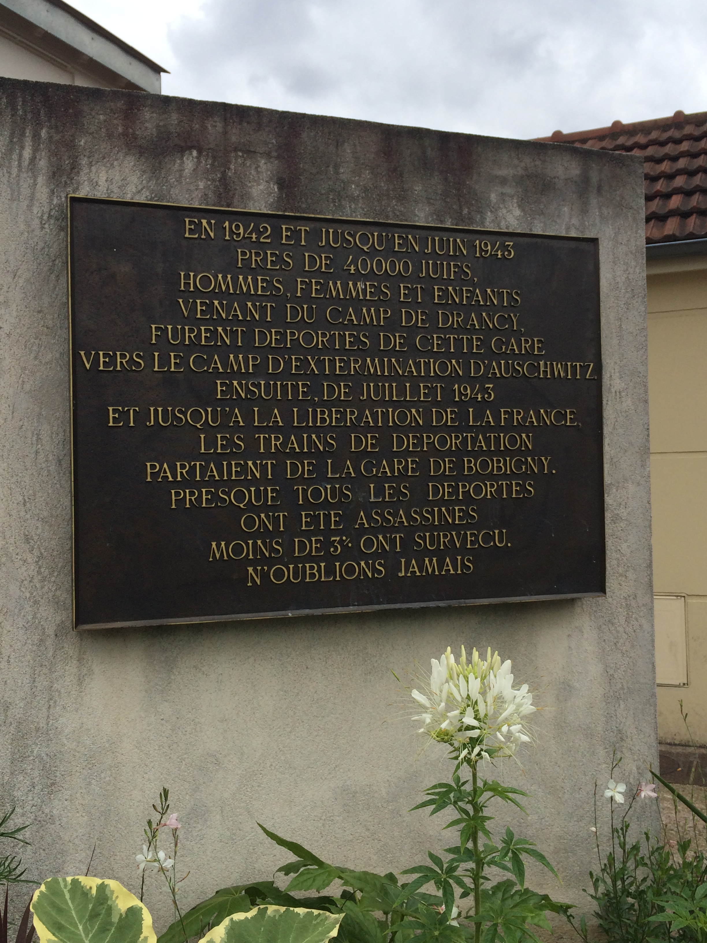 Plaque commémorative de la Déportation installée sur le parvis de la gare du Bourget.